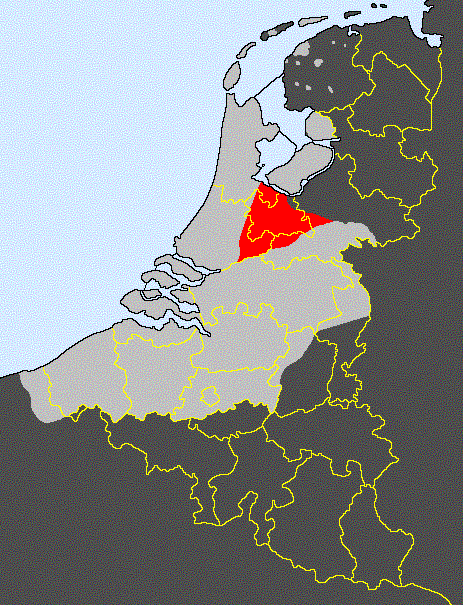 Nedersaksies: Taolgebied Utrechts-Alblasserweerds